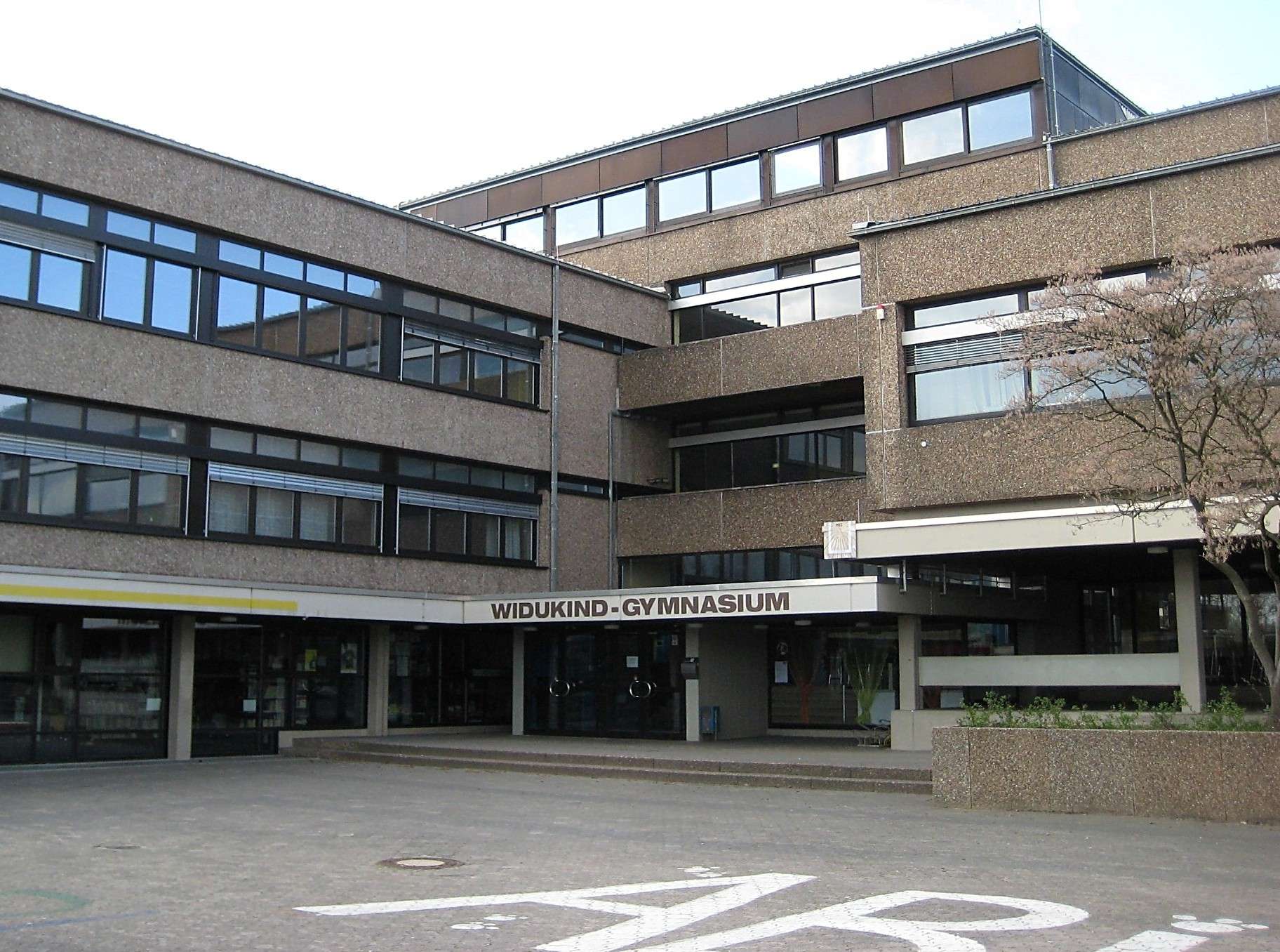 Widukind Gymnasium Enger